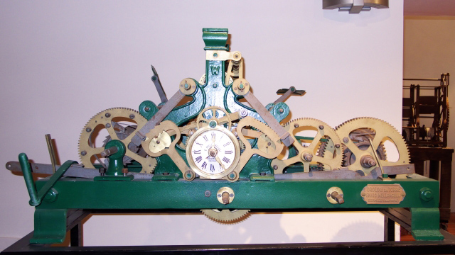 Meccanismo di un orologio. Museo degli Orologi da Torre, San Marco dei Cavoti (BN)